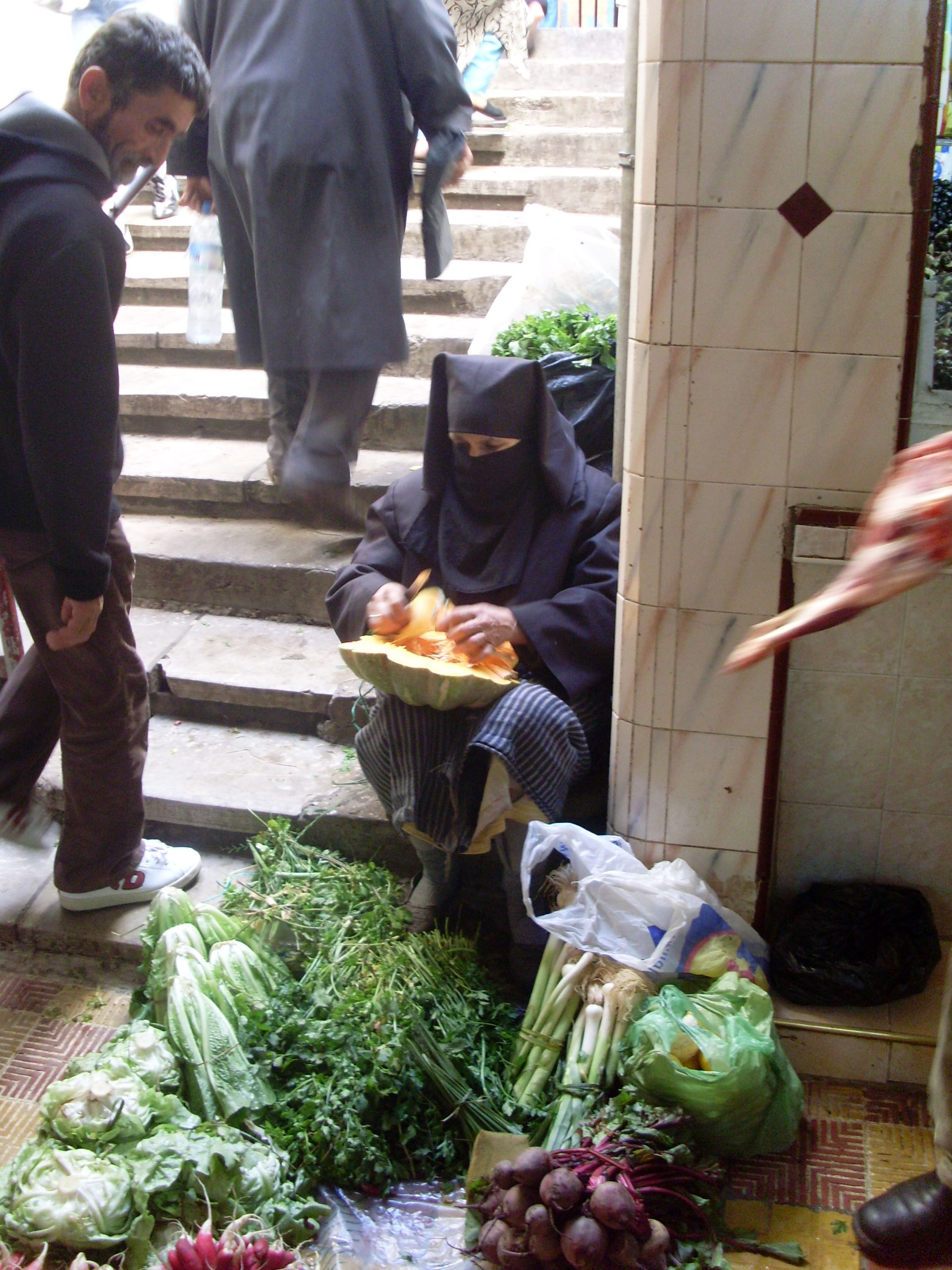 Mujer en un mercado de Marruecos